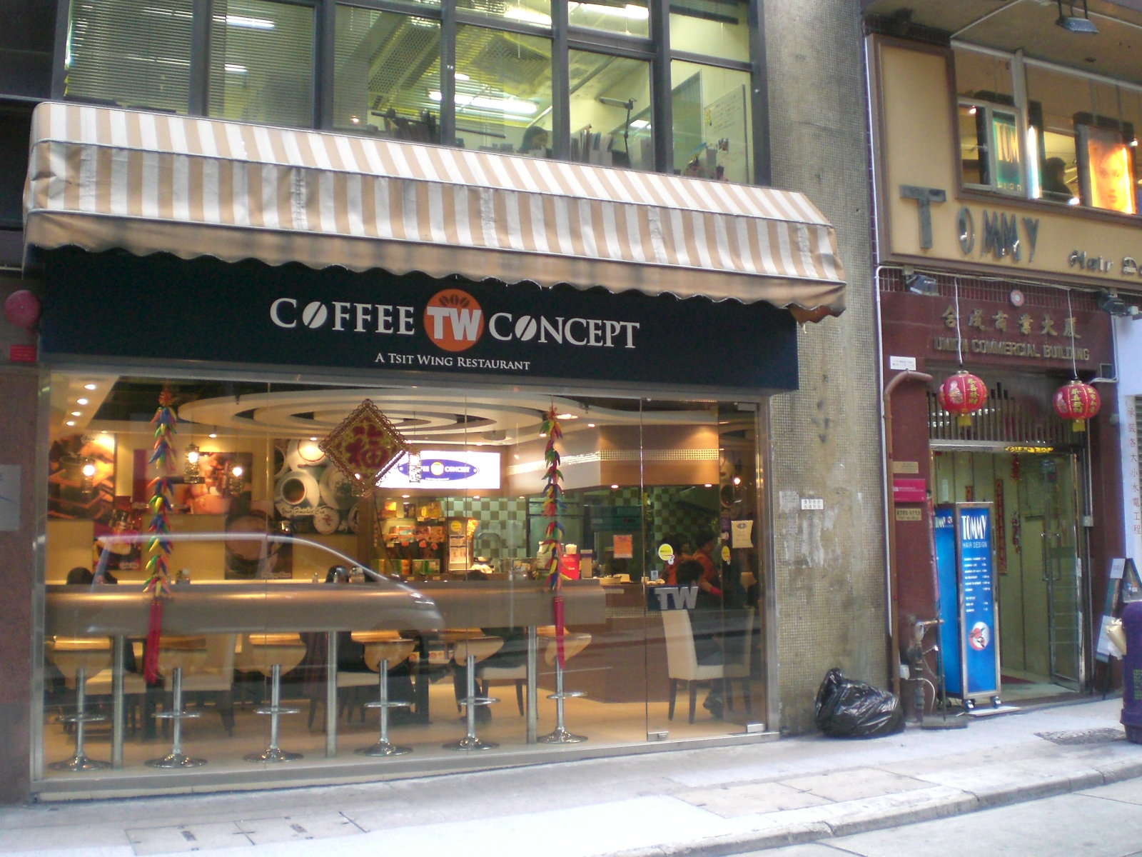 捷榮咖啡餐店 @ 擺花街